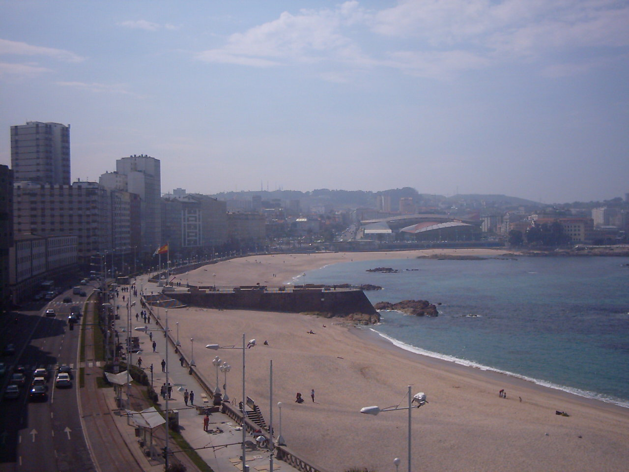 Praia de Orzán, Malecón e Praia de Riazor (ao fondo) en A Coruña